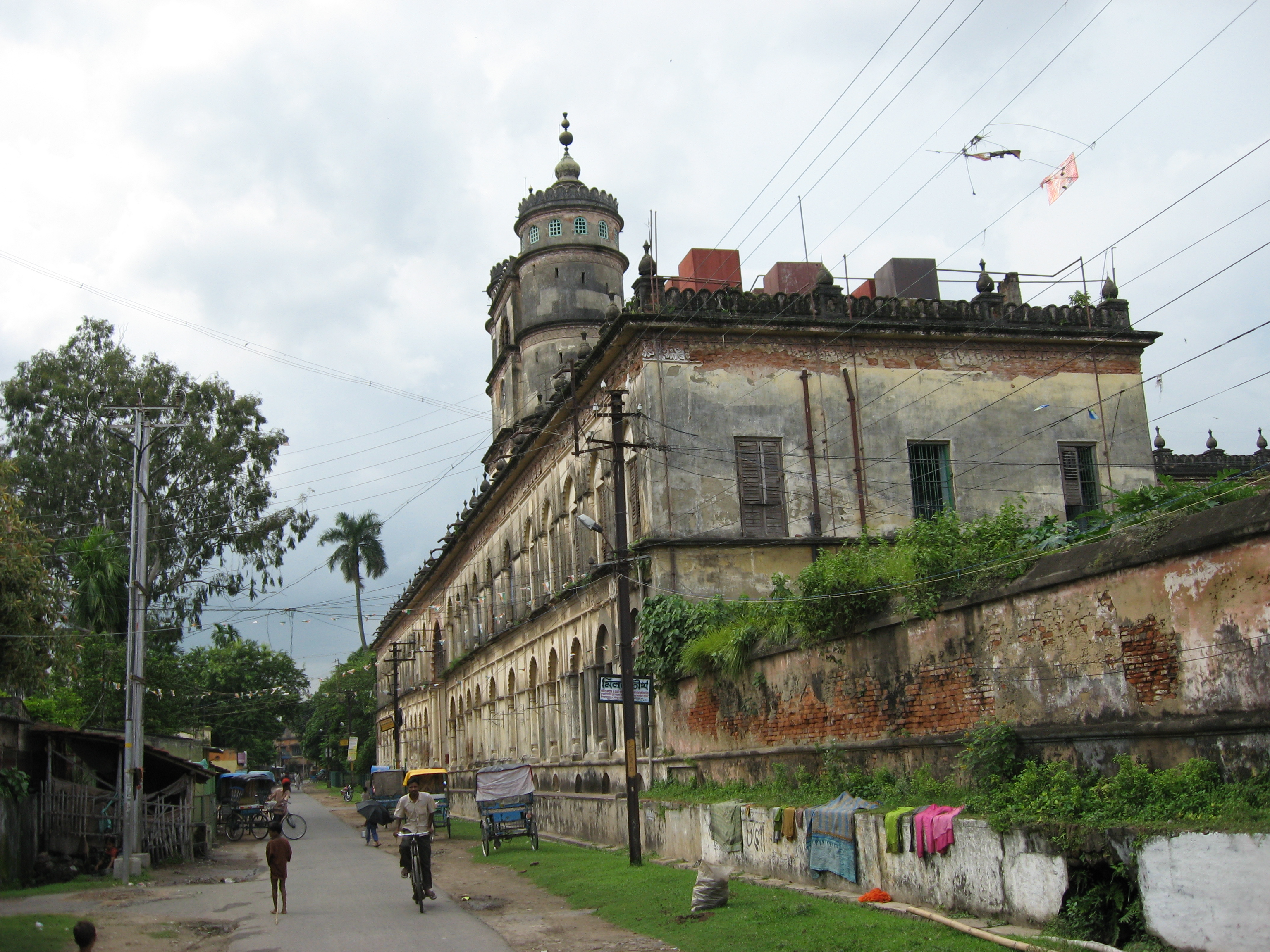 Hooghly Imambara